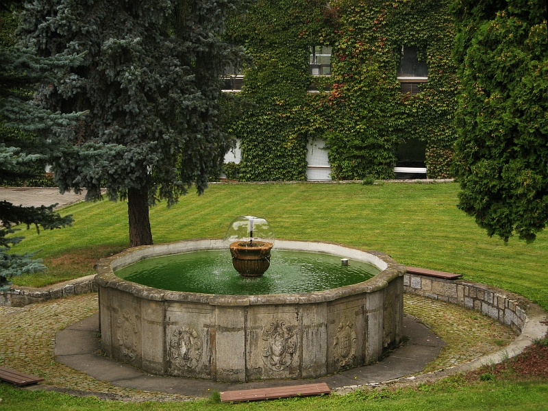 Kašna, v zahradě továrny, Střížovice (okres Jindřichův Hradec).